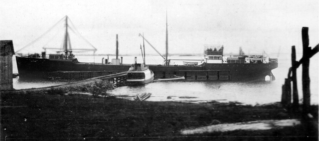 Motorseglaren Lisa under lastning vid bryggan på Aspö utanför Karlskrona år 1917